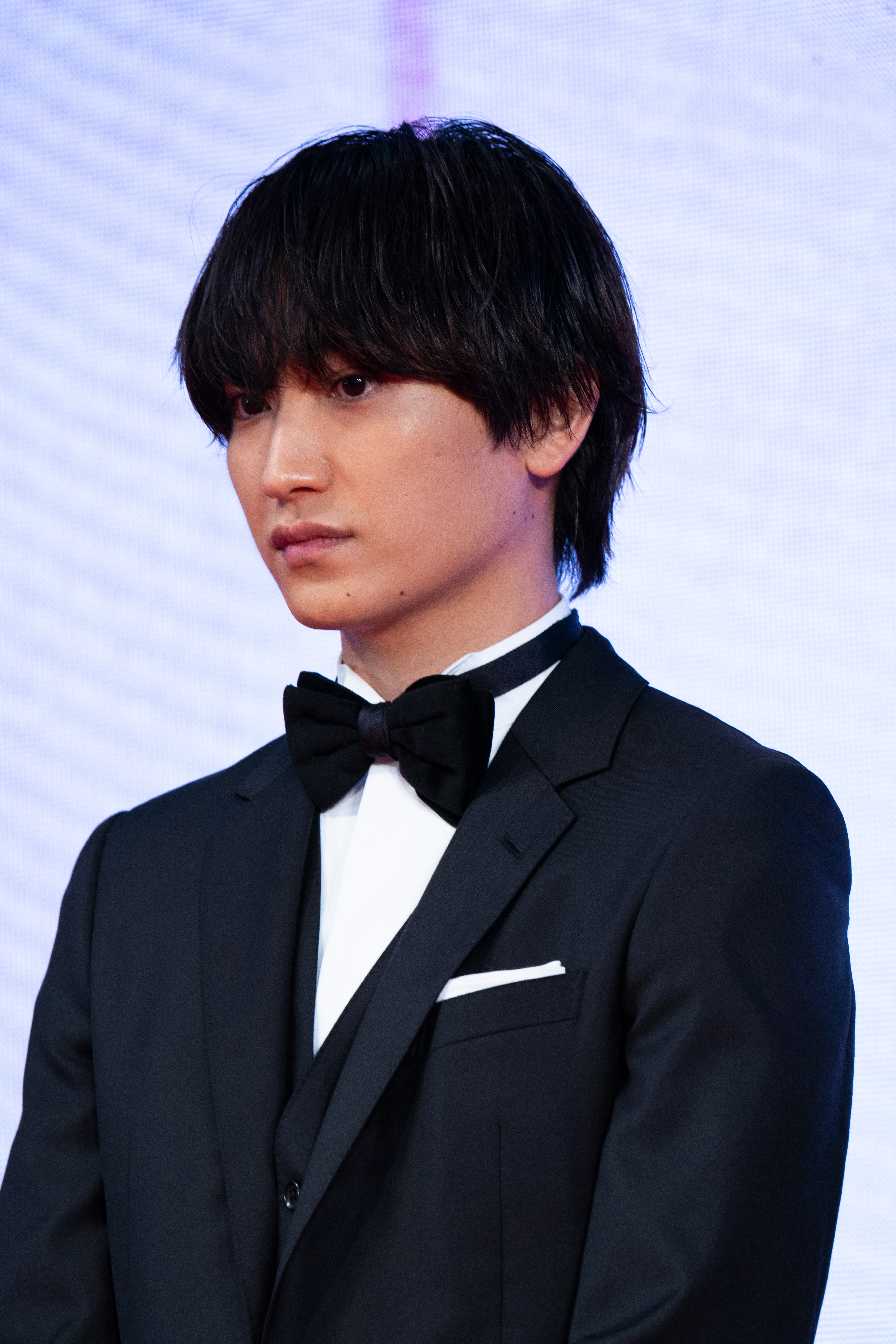 第32回 東京国際映画祭 オープニングセレモニー 金子大地 (猿楽町で会いましょう)